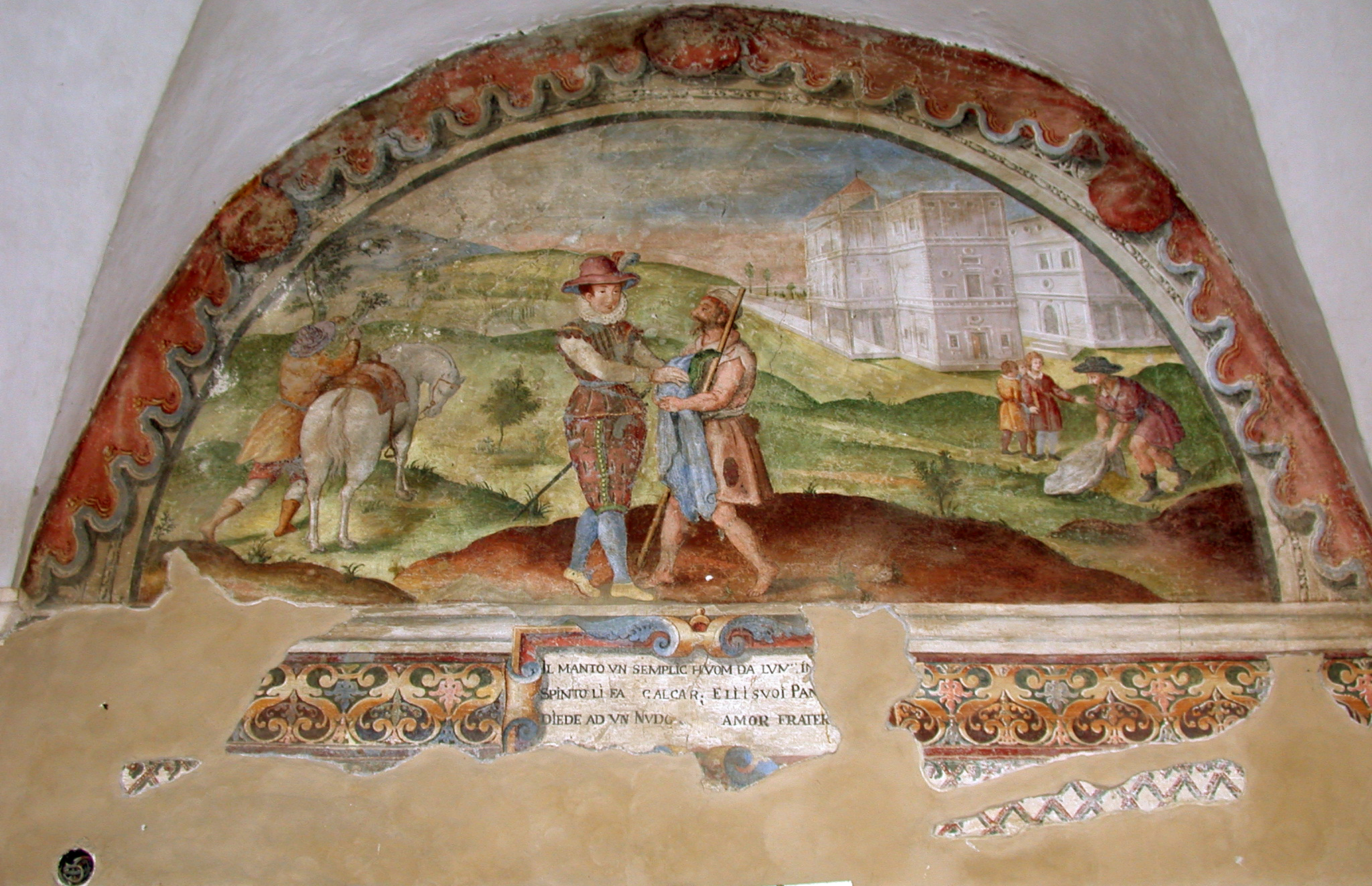 Tagliacozzo (provincia di L'Aquila, Abruzzo, Italia), chiesa francescana di San Francesco, chiostro, uno degli affreschi delle campate del porticato, con storie di san Francesco.